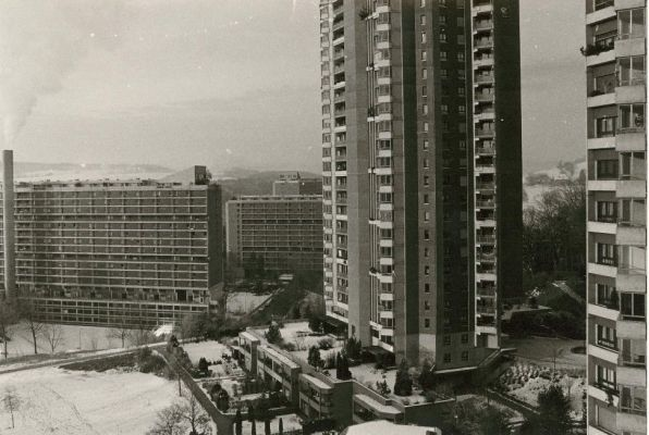 Bethlehem2